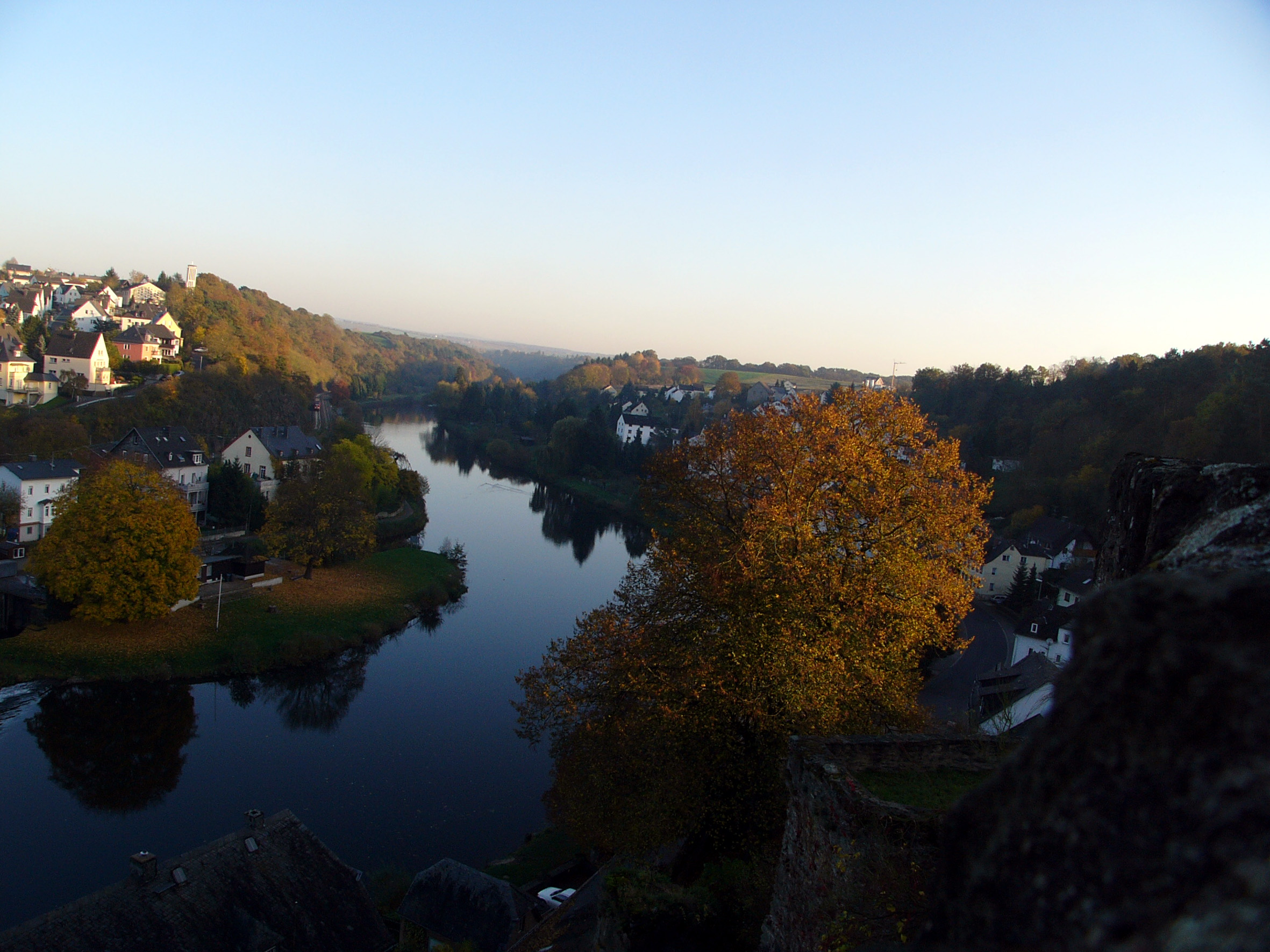 Runkel and river Lahn.